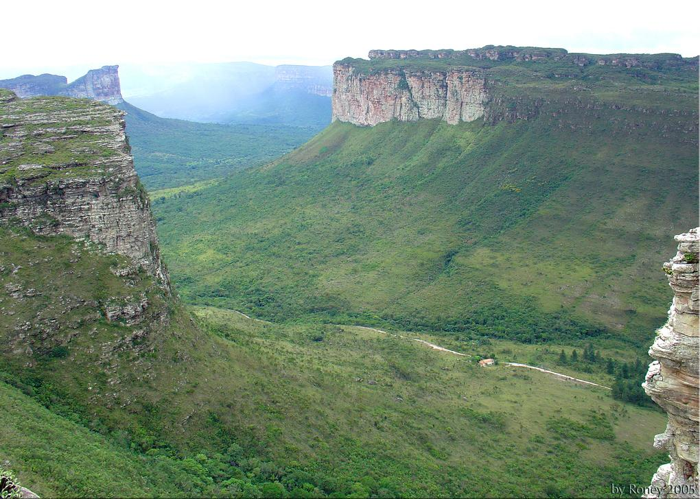 Bahia, Brazil